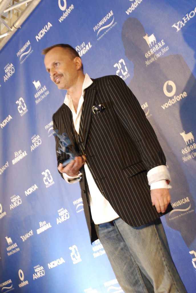 Premios Nokia Amigo 2007, El Informador Digital.